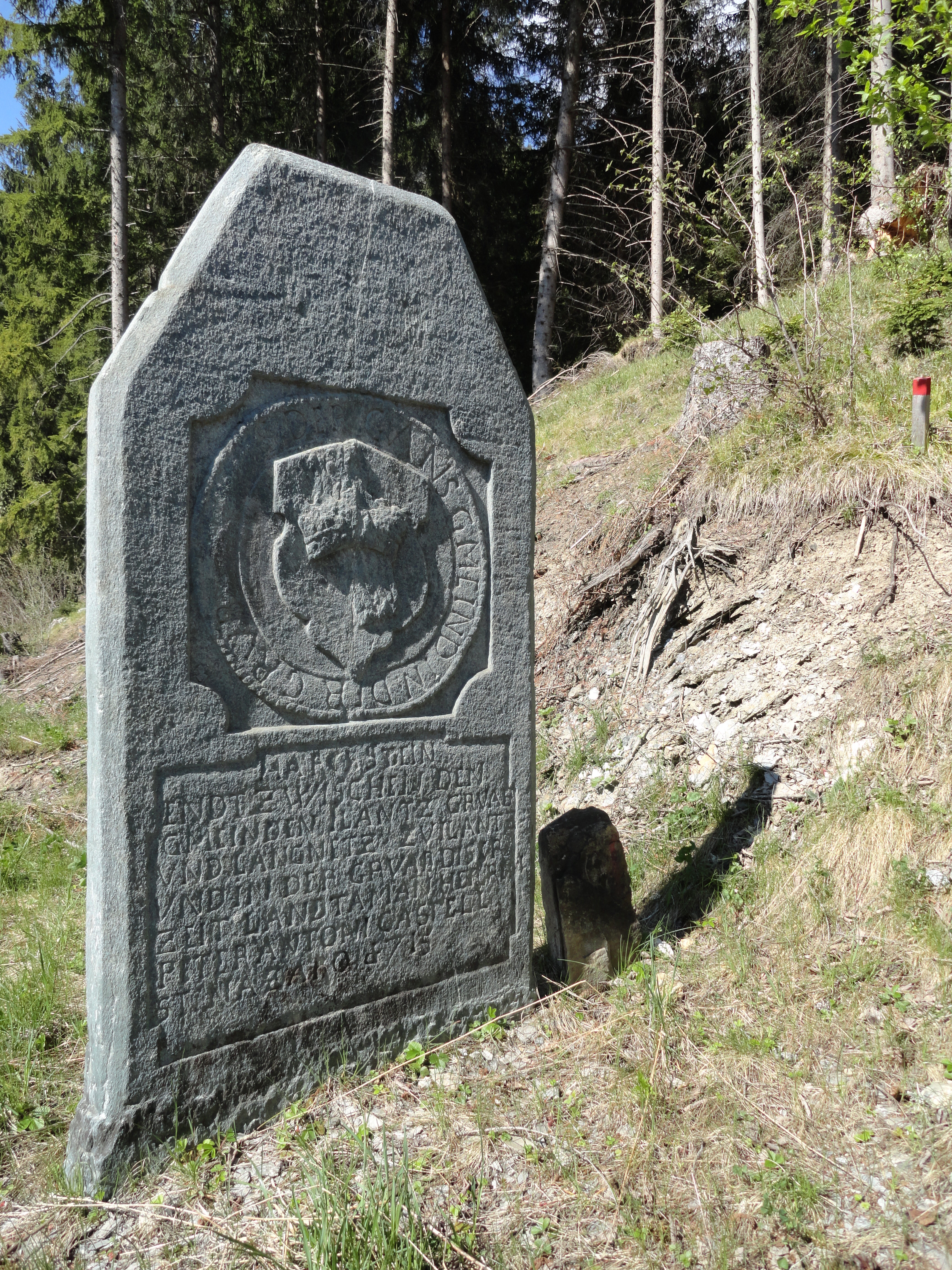 Grenzstein zwischen Cumbel und Luven aus dem Jahr 1715